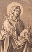 Św. Agnieszka. Ks. Piotr Skarga (zm. 27 września 1612 w Krakowie), Żywoty świętych starego i nowego zakonu, wydanie XXIV, Kraków 1881.]